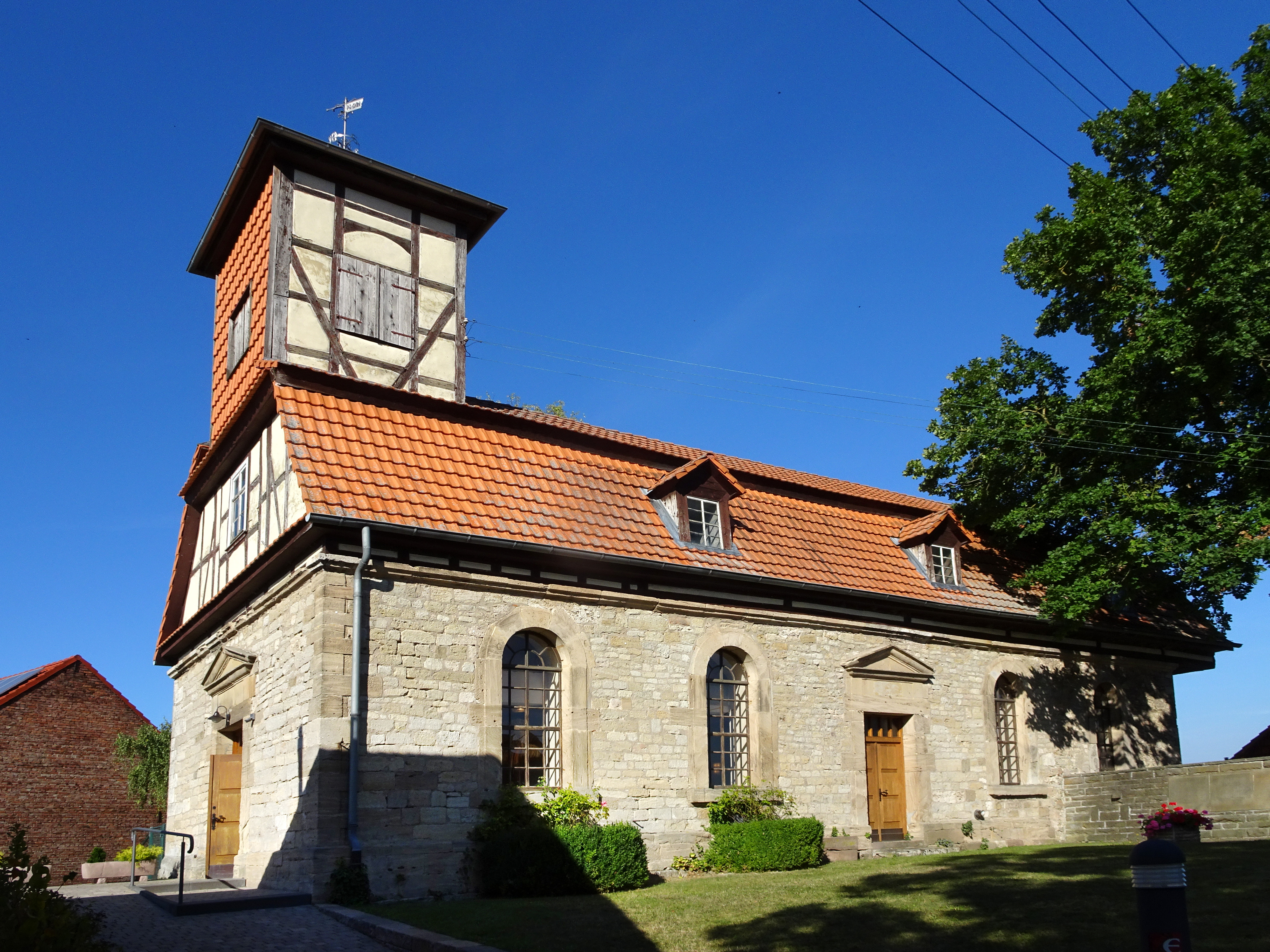 Lüderbach, Gemeinde Ringgau im nordhessischen Werra-Meißner-Kreis. Die evangelische Pfarrkirche des Ortes wurde zwischen 1329 und 1445 erbaut. Im westlichen Teil ist noch romanisches Mauerwerks eines ehemaligen Wehrturms erhalten. Durch Lüderbach führen der Herkules-Wartburg-Radwanderweg, der Werra-Burgen-Steig Hessen (X5H) und der Elisabethpfad.